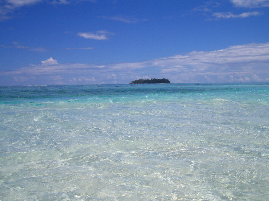 Photo de Tekava aux Îles Gambier en Polynésie française (Photo personnel 2006) Utilisateur:FRED